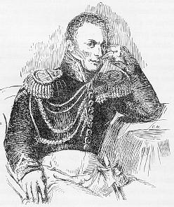 Camille Trezel (1780-1860), french general